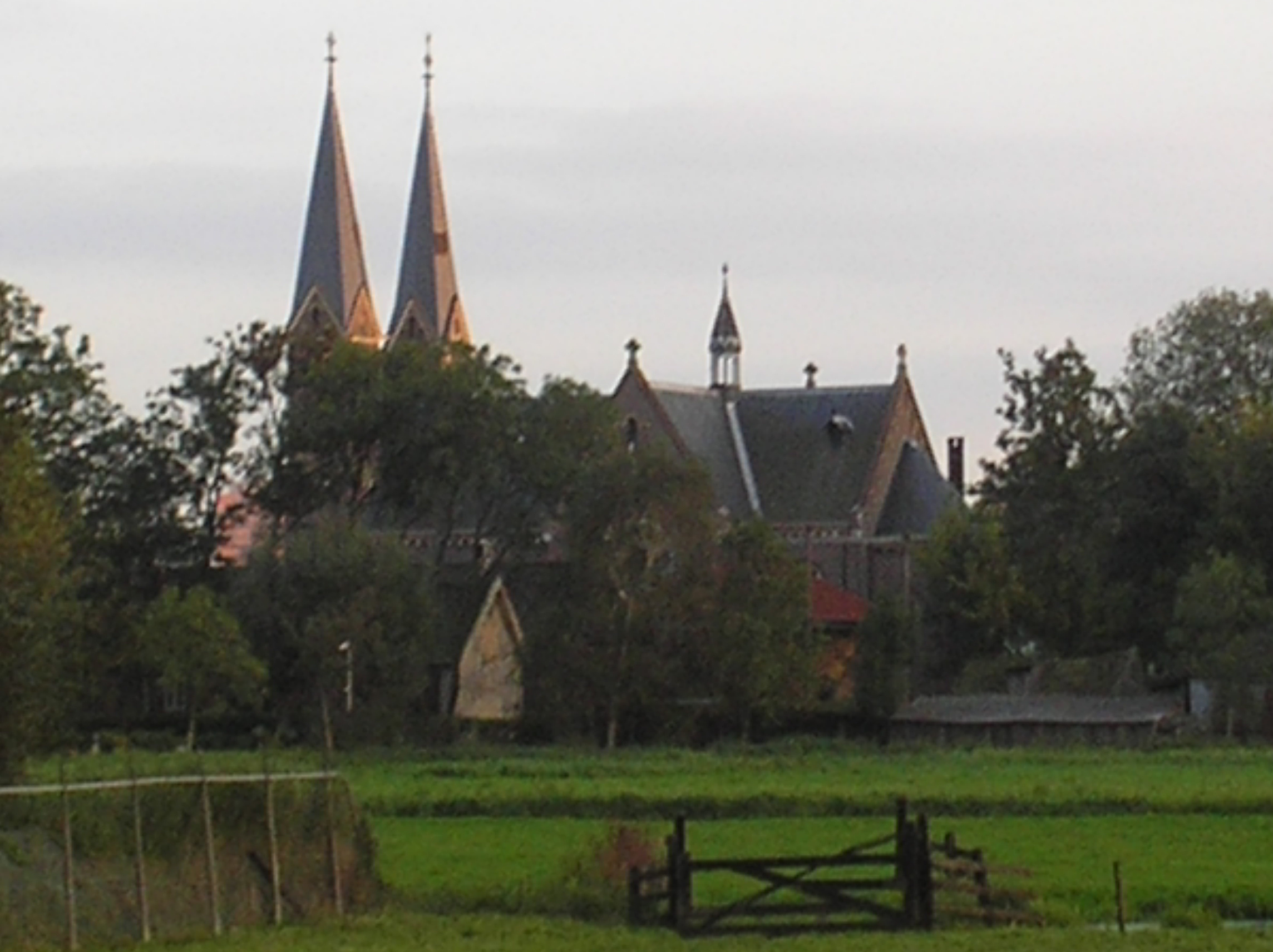 zelfgemaakte foto